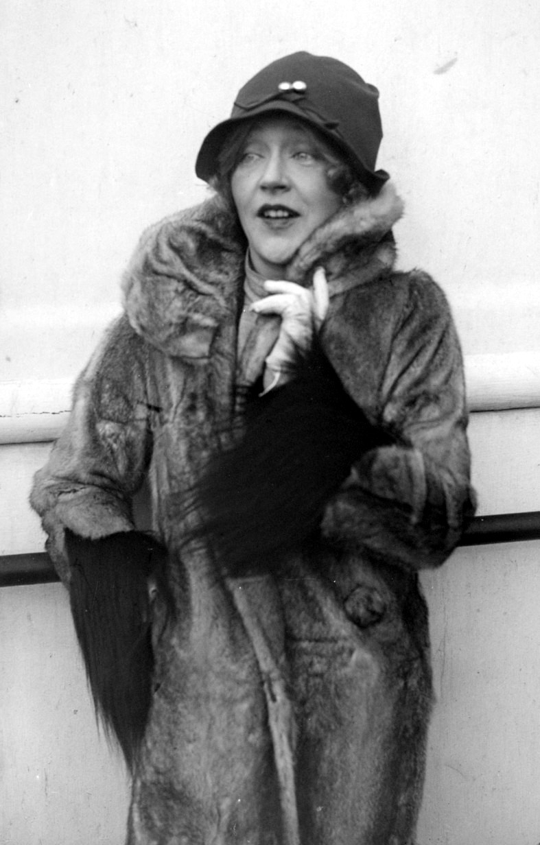 Mae Murray